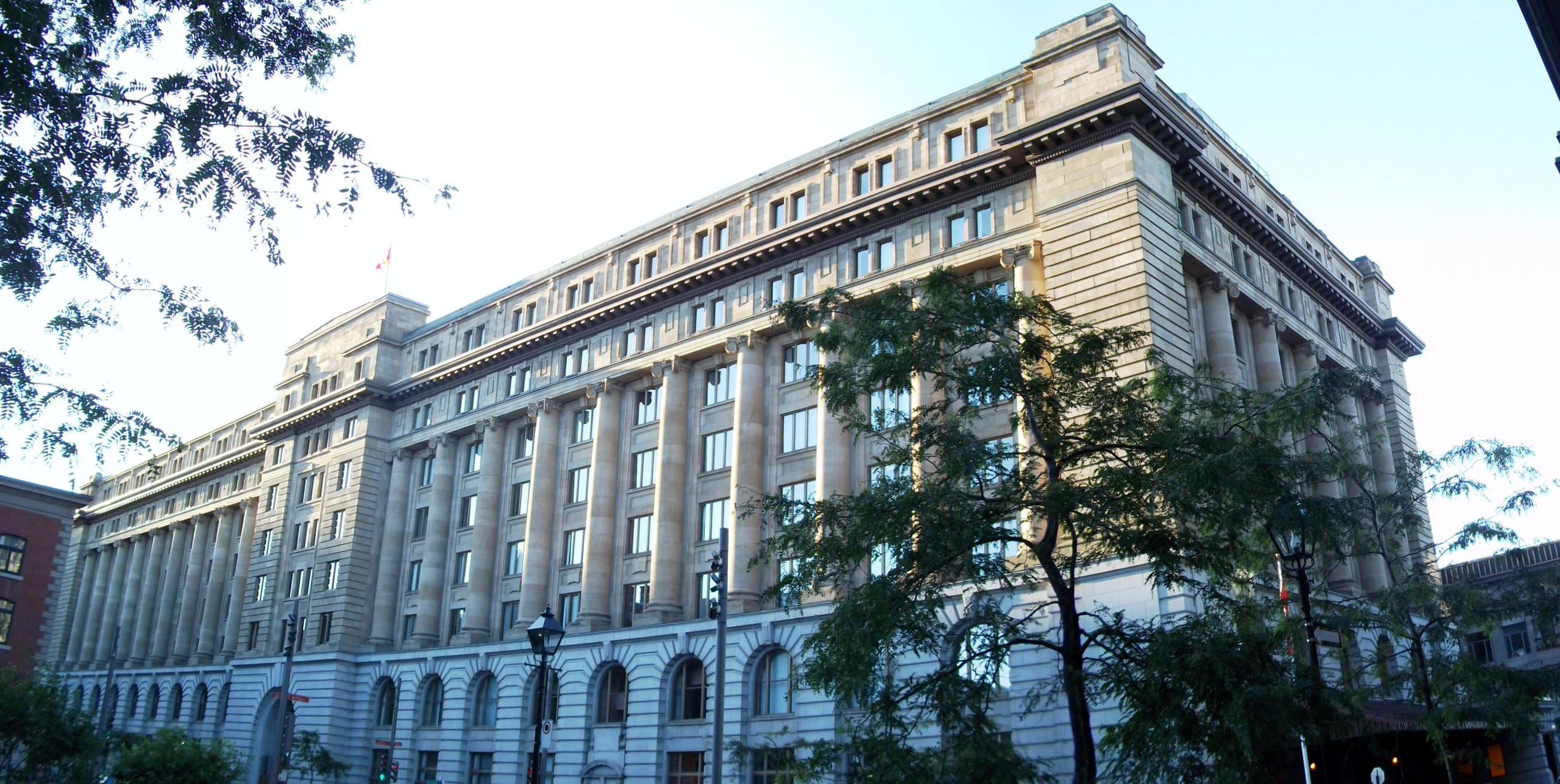 Édifice des Douanes, vu de la rue McGill, Montréal